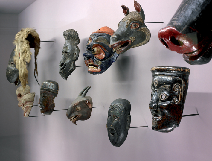 Salle Himalaya-Tibet